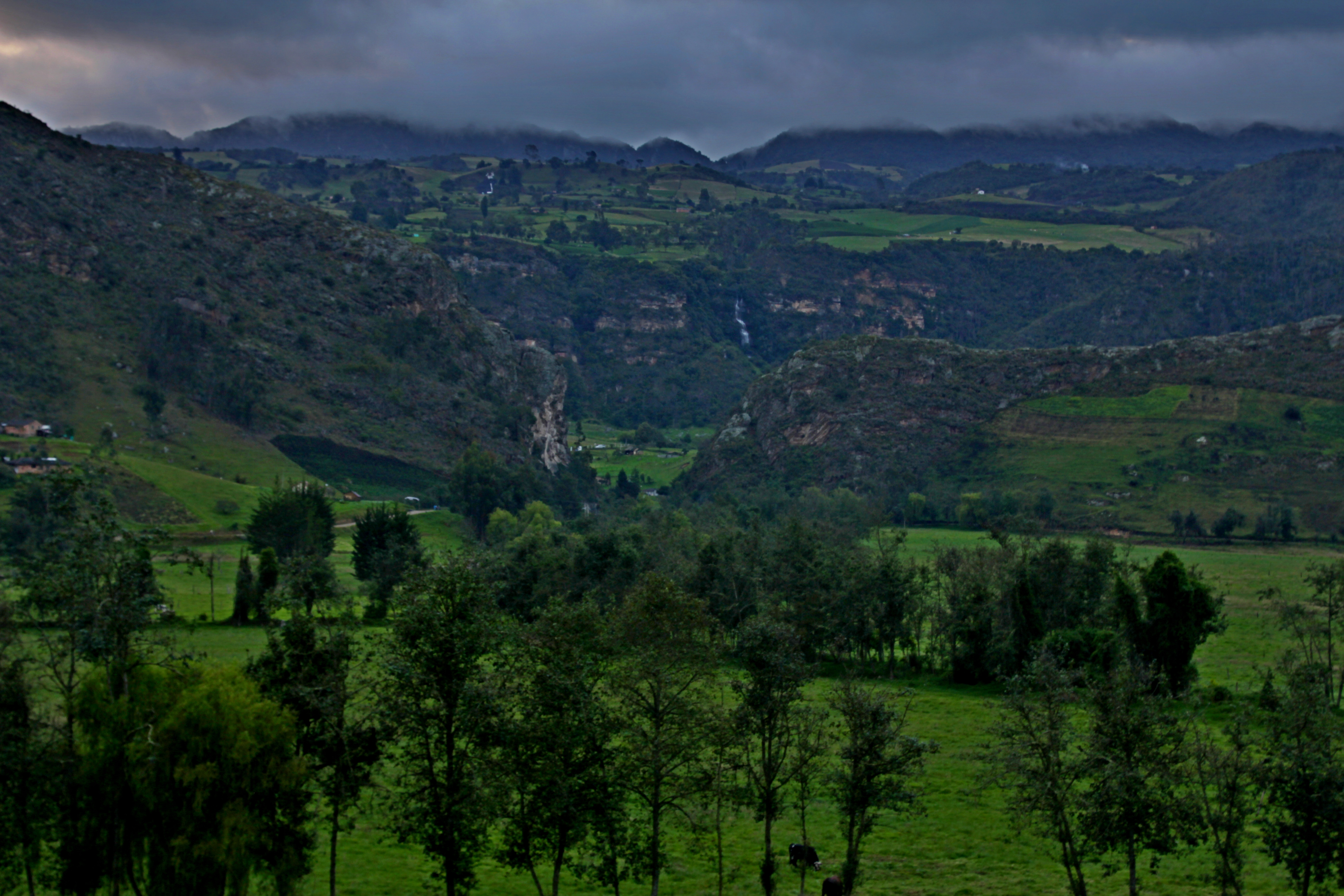 Paisajes de Boyacá